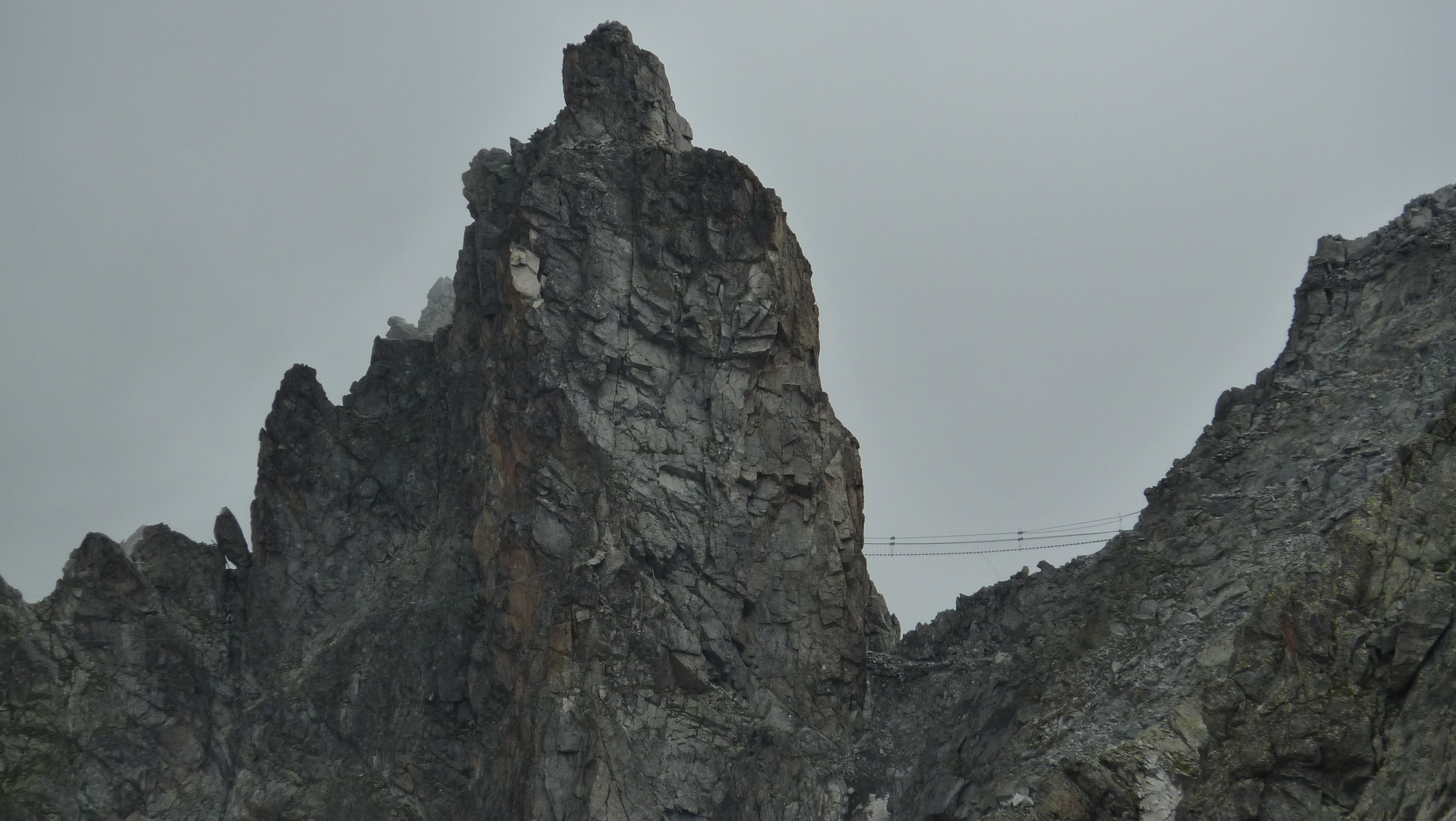 Gendarme di Casamadre, nelle Alpi Orobie, al confine tra Lombardia e Trentino Alto-Adige.